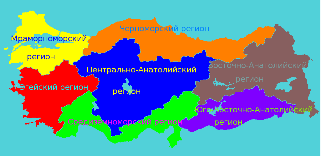 Деление Турецкой республики на регионы